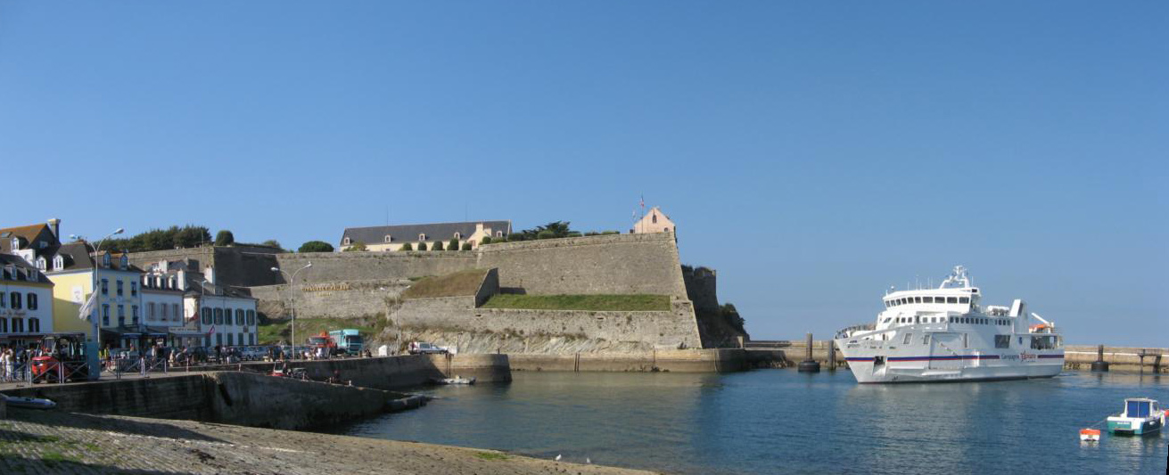 Le Palais et la citadelle